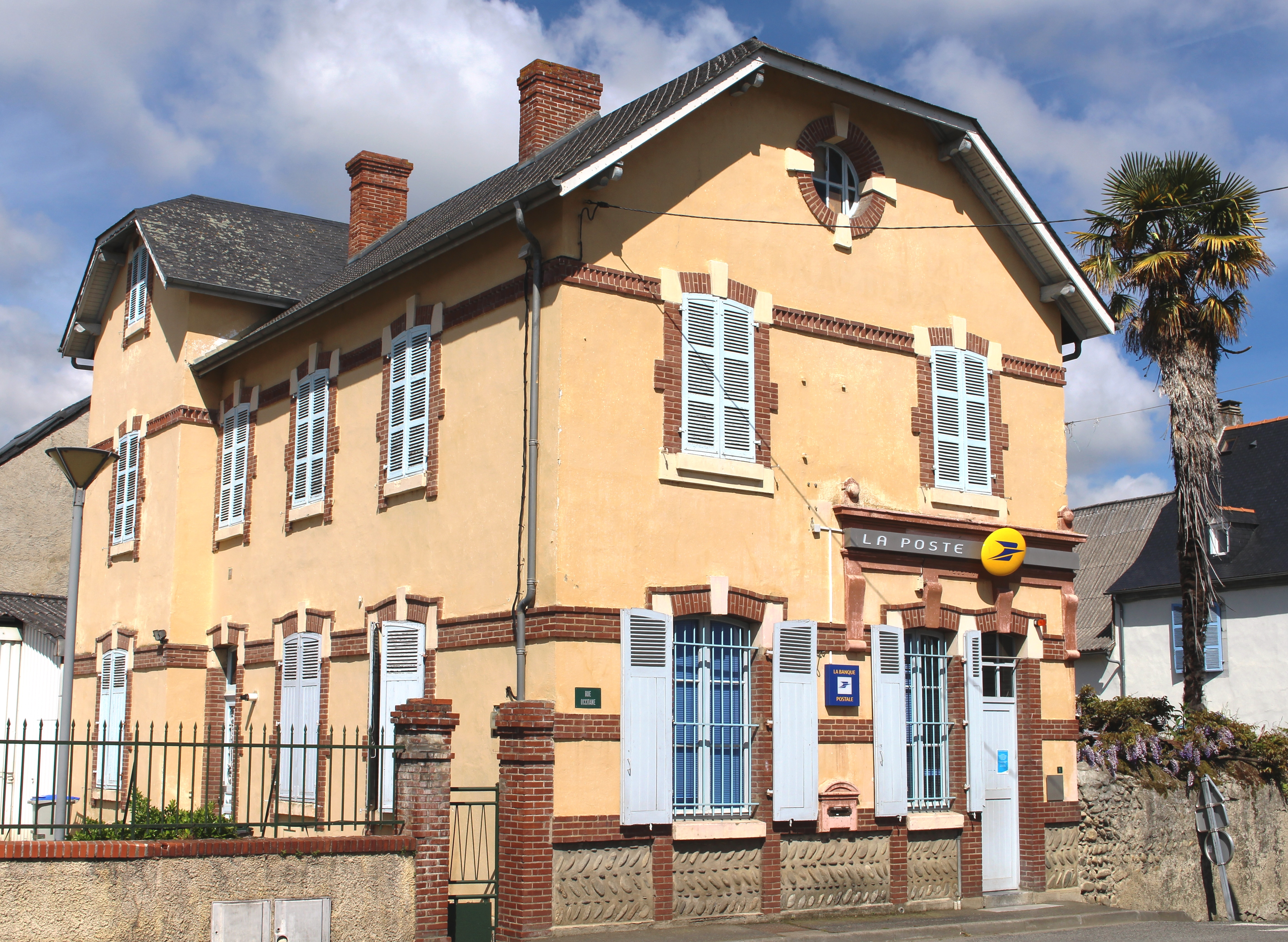 Poste de Bernac-Debat (Hautes-Pyrénées)